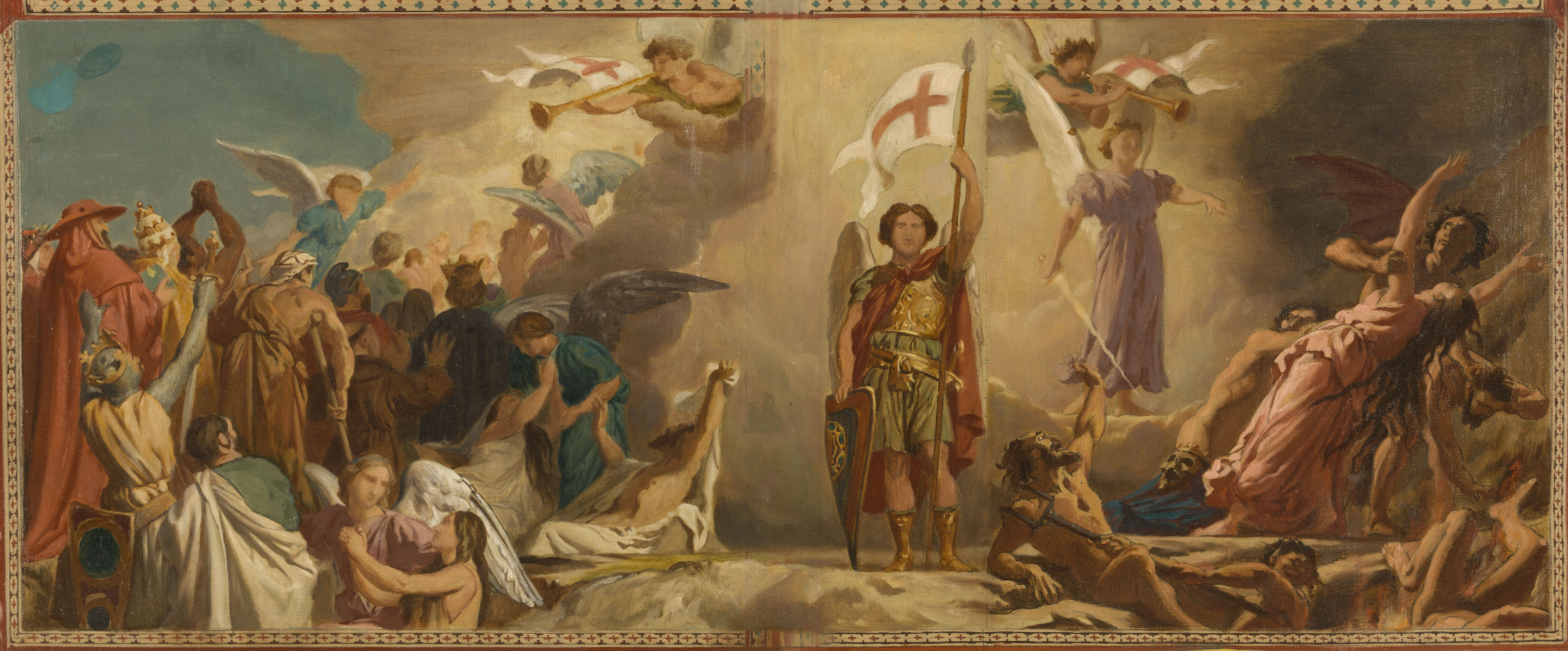 Esquisse pour l'eglise de Saint-Germain-des-Prés - Le Jugement Dernier